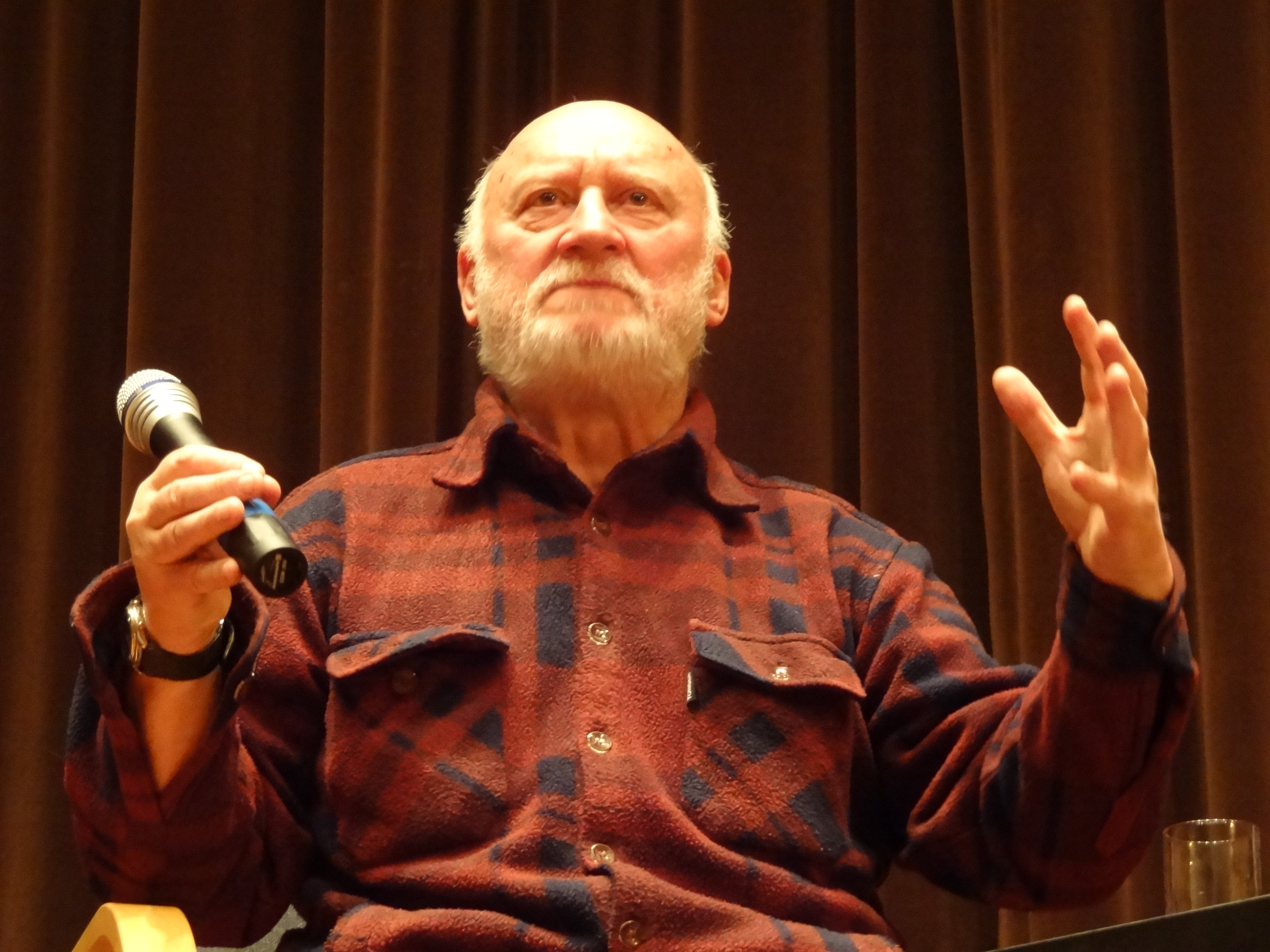 Grzegorz Królikiewicz 2013, fot. Michał Dondzik.